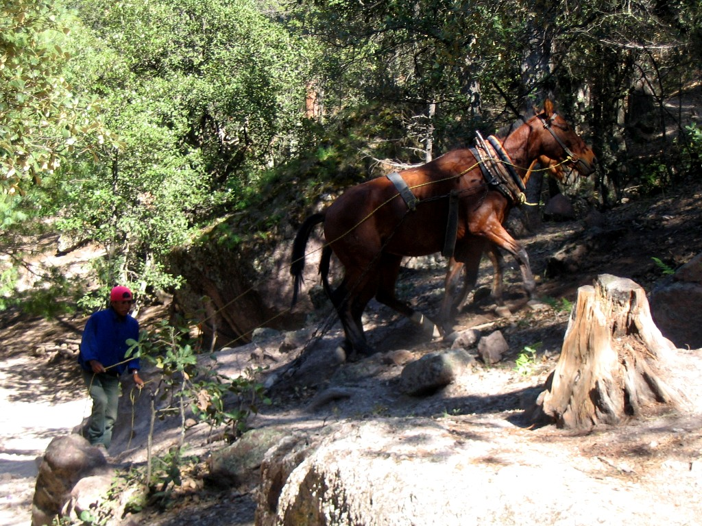 Hombre taraumara recogiendo leña de árboles caidos. Reserva aborigen en Chihuahua, México.